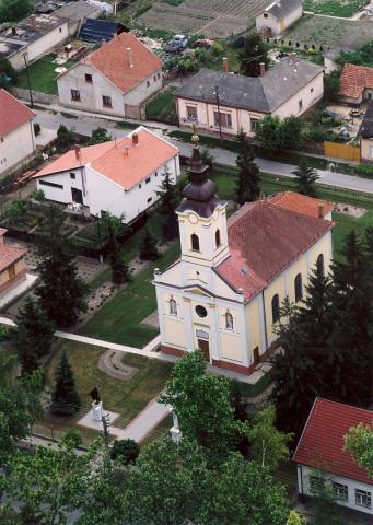 Kocsér, Hungary, aerialphotography. Szent István király római katolikus templom